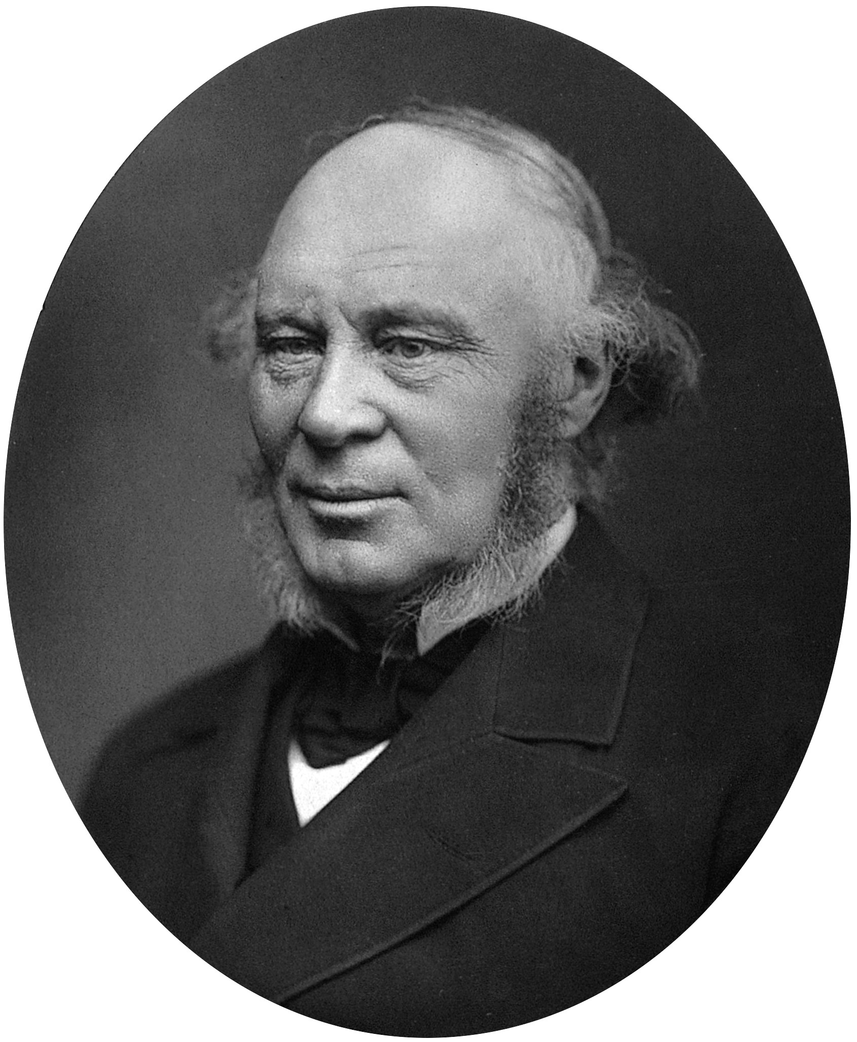 Sir John Fowler, 1st Baronet